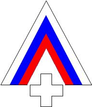 нарукавный знак северо-западной армии